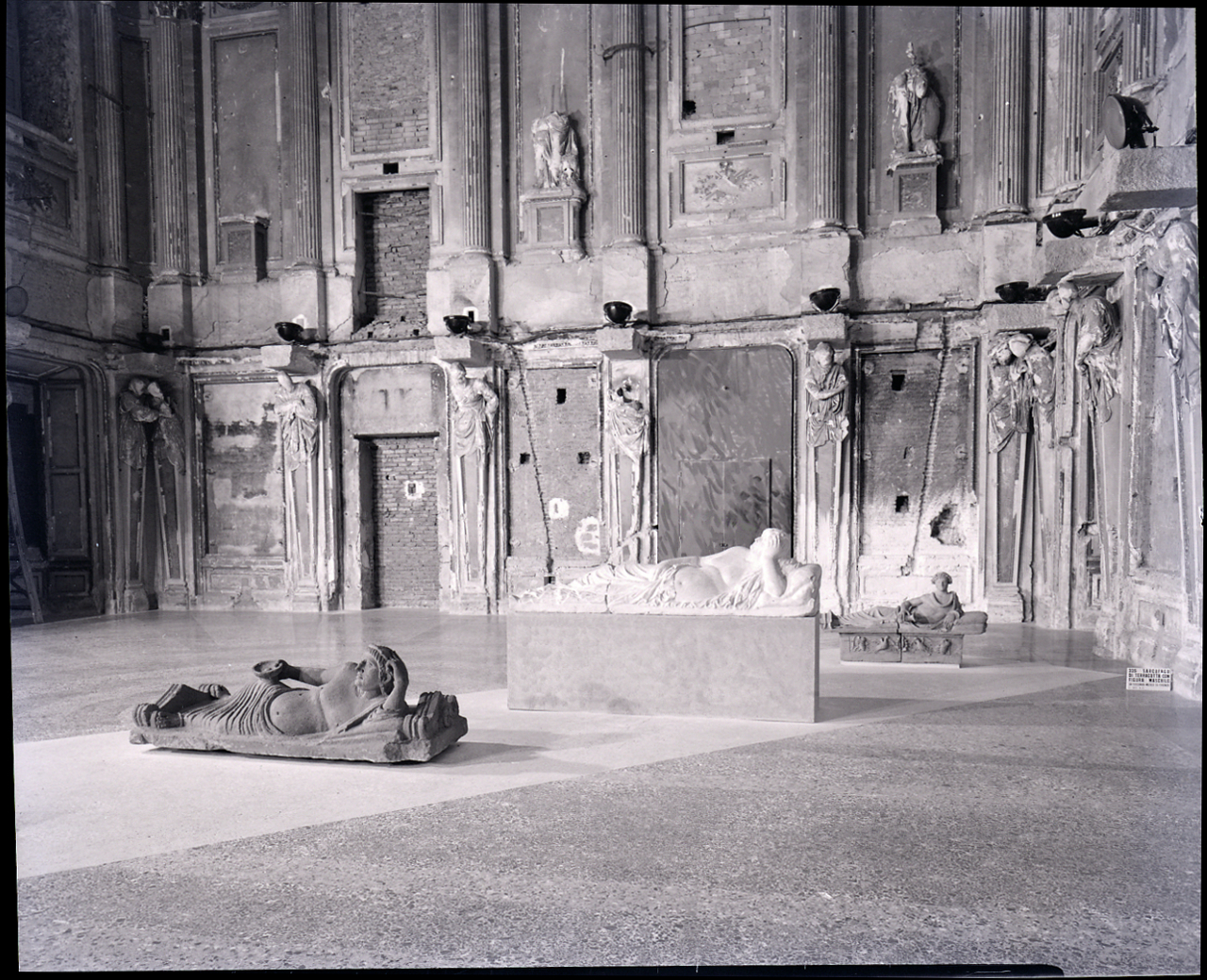 Servizio fotografico : Milano, 1955 / Paolo Monti. - Buste: 5, Fototipi: 5 : Negativo b/n, gelatina bromuro d'argento/ pellicola ; 10x12. - ((Serie costituita da 5 buste di negativi identificati con i nn. 4109, 4110, 4111, 4112, 4113, e tenute insieme con da una graffetta. - Sulla busta identificata con il n. 4109 iscrizione didascalica manoscritta a pennarello. - La mostra si tenne a Palazzo Reale nei mesi aprile-giugno. - Occasione: Documentazione per la pubblicazione: "Mostra dell'arte e della civiltà etrusca", catalogo della mostra, Milano 1955, Milano, Silvana editoriale d'arte, 1955. - Fonte: Rubrica di Paolo Monti: Archivio 10x12 (ultimi numerati) - dal G1 al (s.d.), presso Archivio Paolo Monti. - Fonte: Monografia: Mostra dell'arte e della civiltà etrusca, catalogo della mostra, Milano 1955, Milano, Silvana editoriale d'arte (1955)